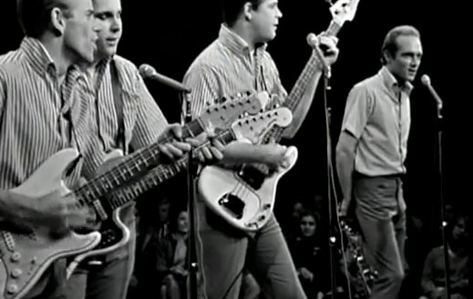 The Beach Boys en el concierto denominado The Lost Concert.